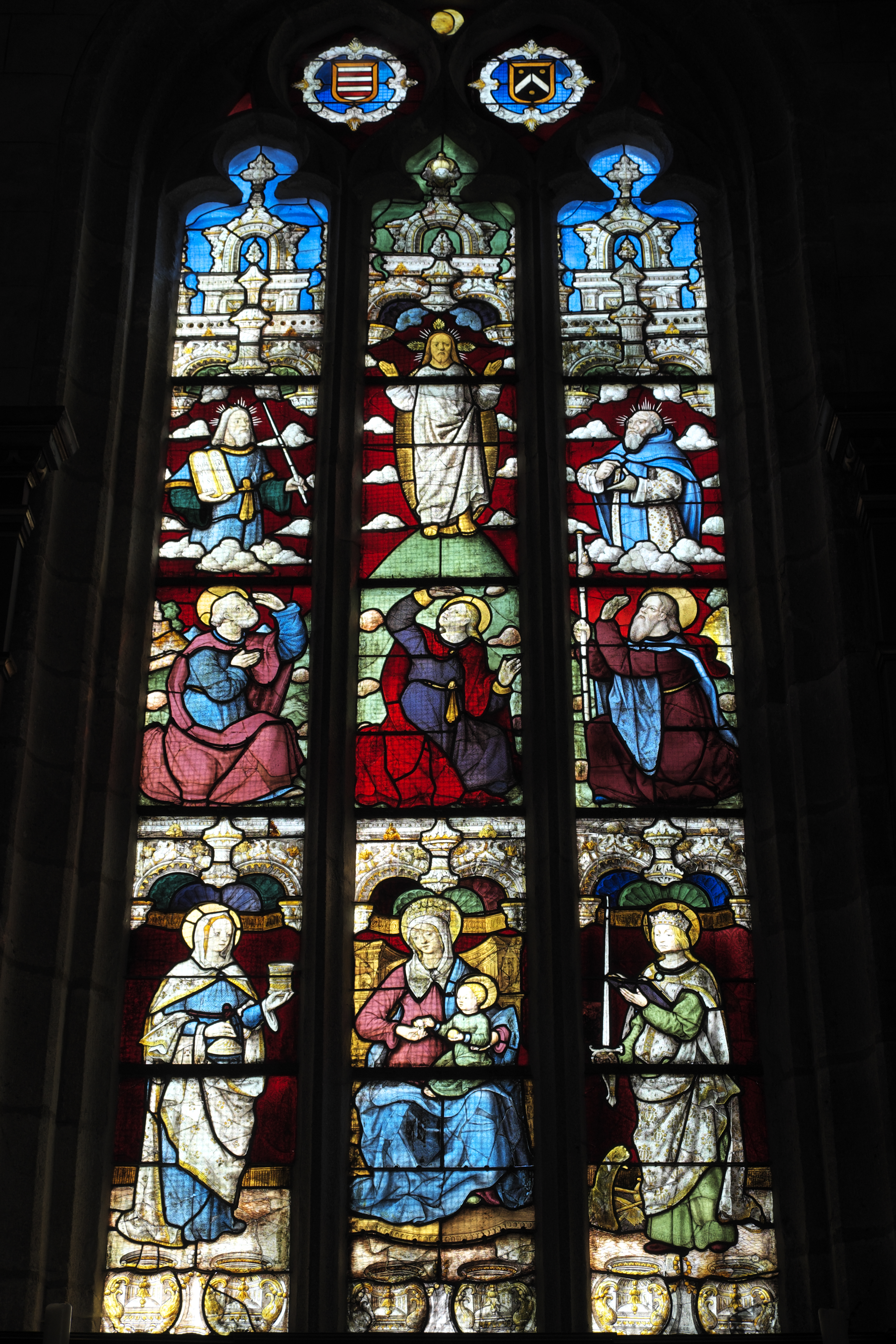 Katholische Pfarrkirche Saint-Thurien in Plogonnec im Département Finistère (Region Bretagne/Frankreich), Bleiglasfenster (baie 1) um 1520, Laurent Le Sodec zugeschrieben; Darstellung: Verklärung Christi zwischen Moses und Elias (oben); Apostel Petrus, Johannes und Jakobus (Mitte); Maria Magdalena, Maria mit Jesuskind, heilige Katharina (unten)